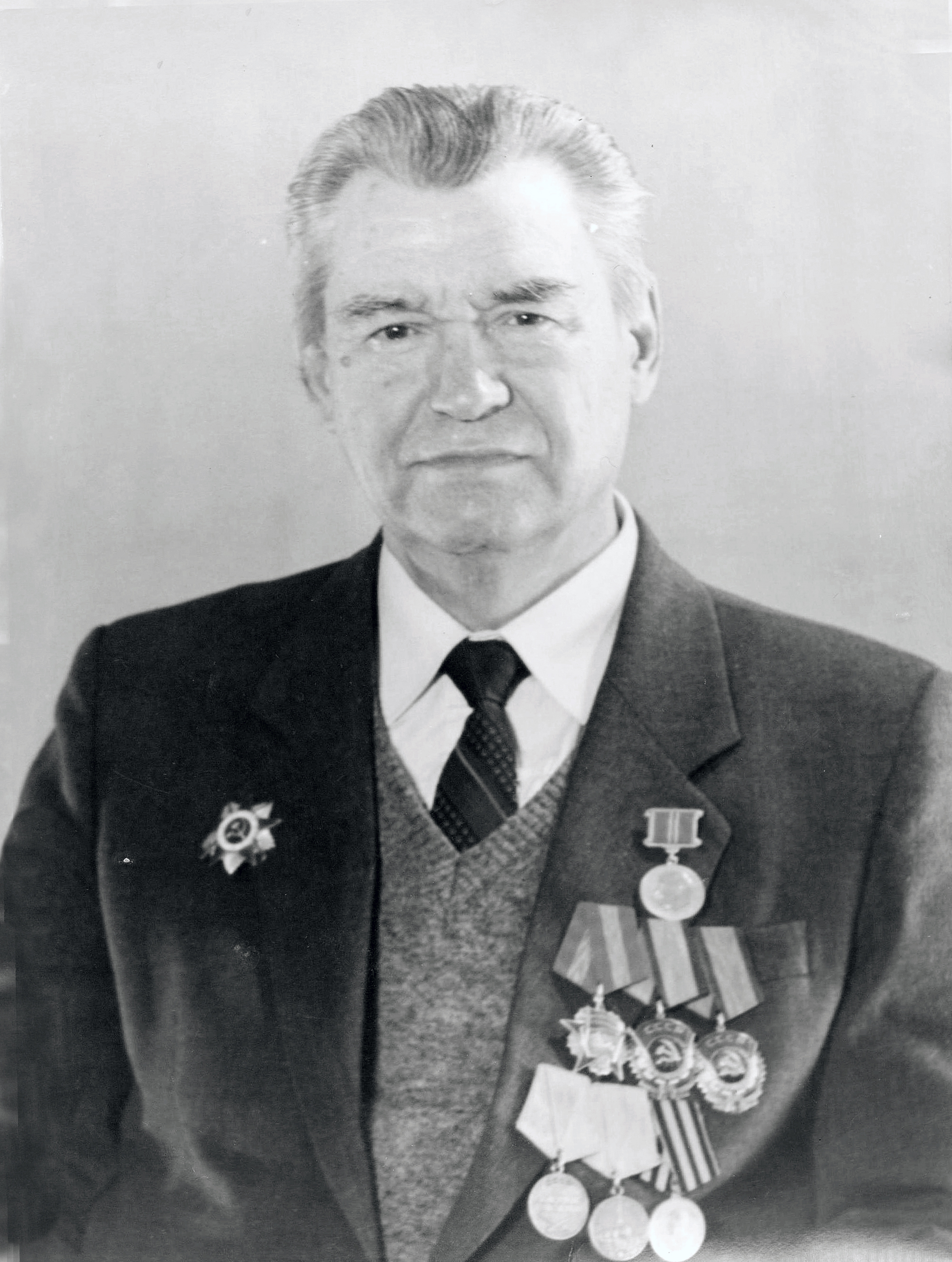 Это отсканированное фото моего деда. У меня имеется оригинальное бумажное фото.